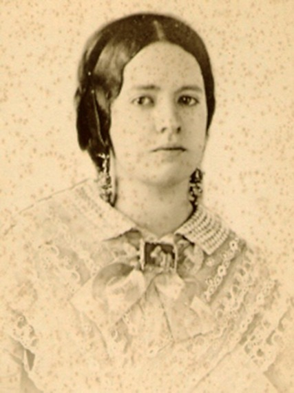 Eulogia Echaurren García-Huidobro (Santiago, 1830 - ibídem, 27 de abril de 1887) fue primera dama de Chile y la esposa del presidente Federico Errázuriz Zañartu.